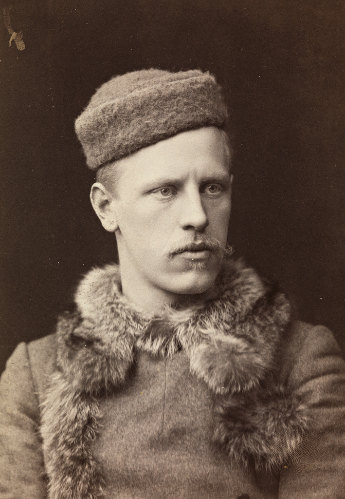 Tittel / Title: Portrett av Fridtjof Nansen Motiv / Motif: Fridtjof Nansen i jakke med pelskrave og en kalott på hode. Dato / Date: 1888 Fotograf / Photographer: Ludwik Szacinski de Ravics (1844-1894) Sted / Place: Oslo Eier / Owner Institution: Nasjonalbiblioteket / National Library of Norway Lenke / Link: Bildesignatur / Image Number: no-nb_bldsa_1a016